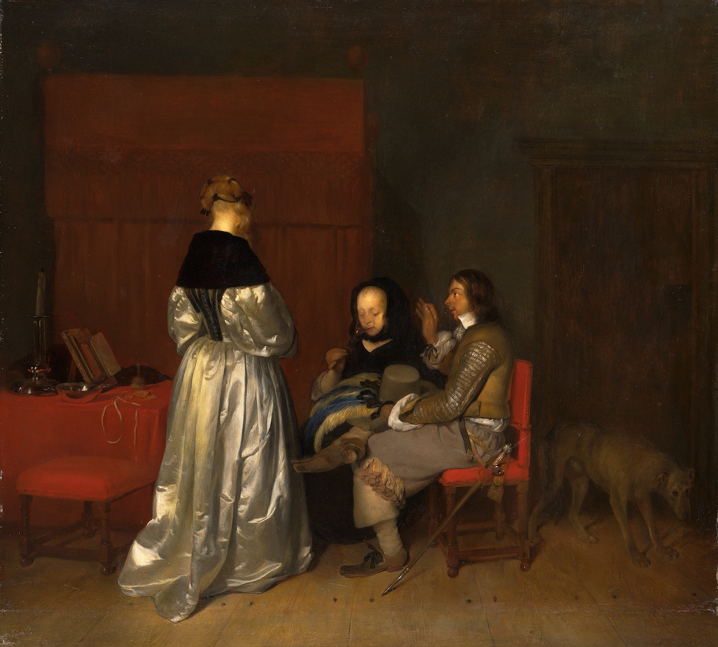 schilderij; genre